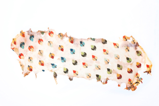 Xarabagilandan aşkar edilmiş orta əsrlərə aid ipək parça qalığı